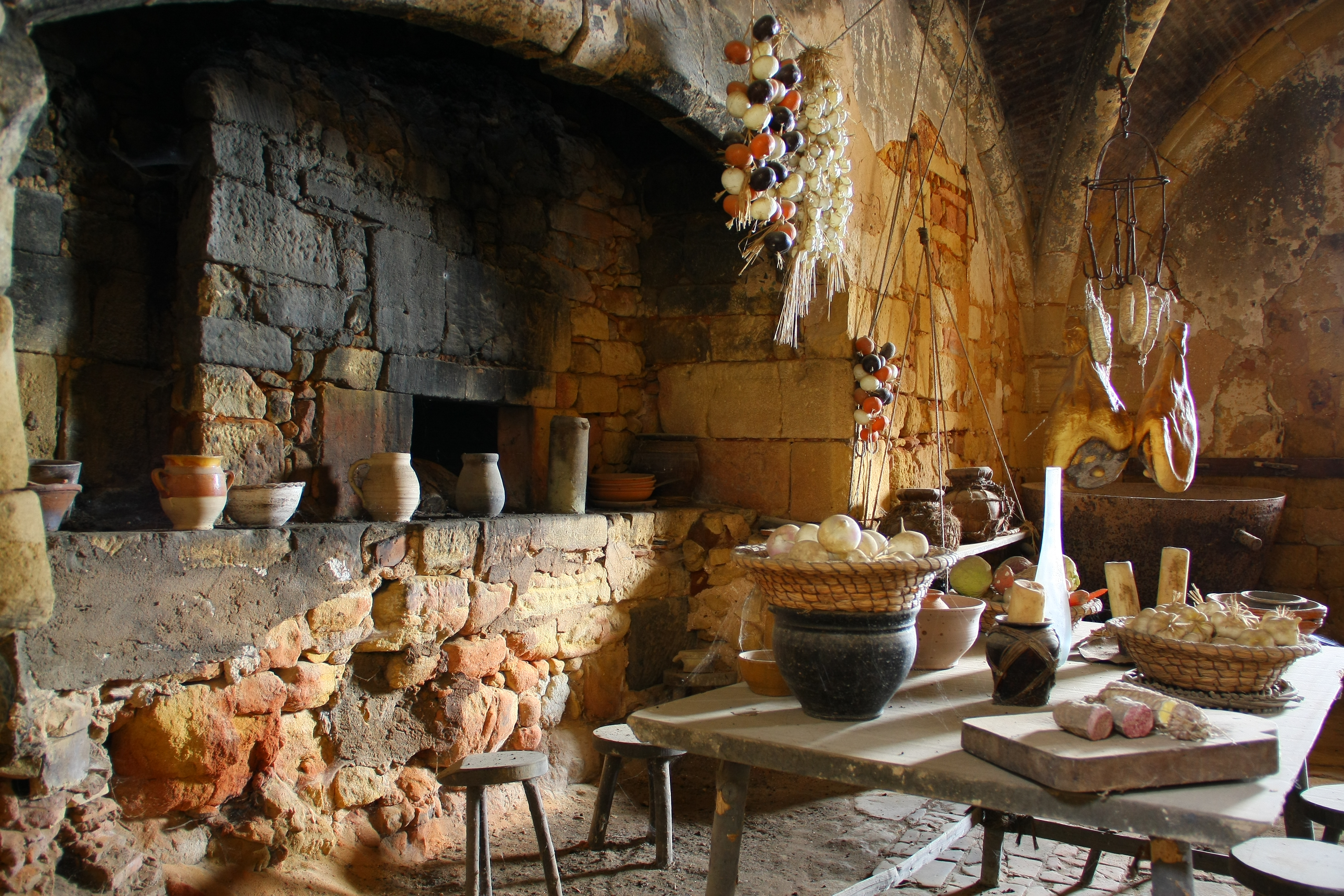 Schlossküche im Schloss Biron, Dordogne, Perigord This building is en partie classé, en partie inscrit au titre des Monuments Historiques. .